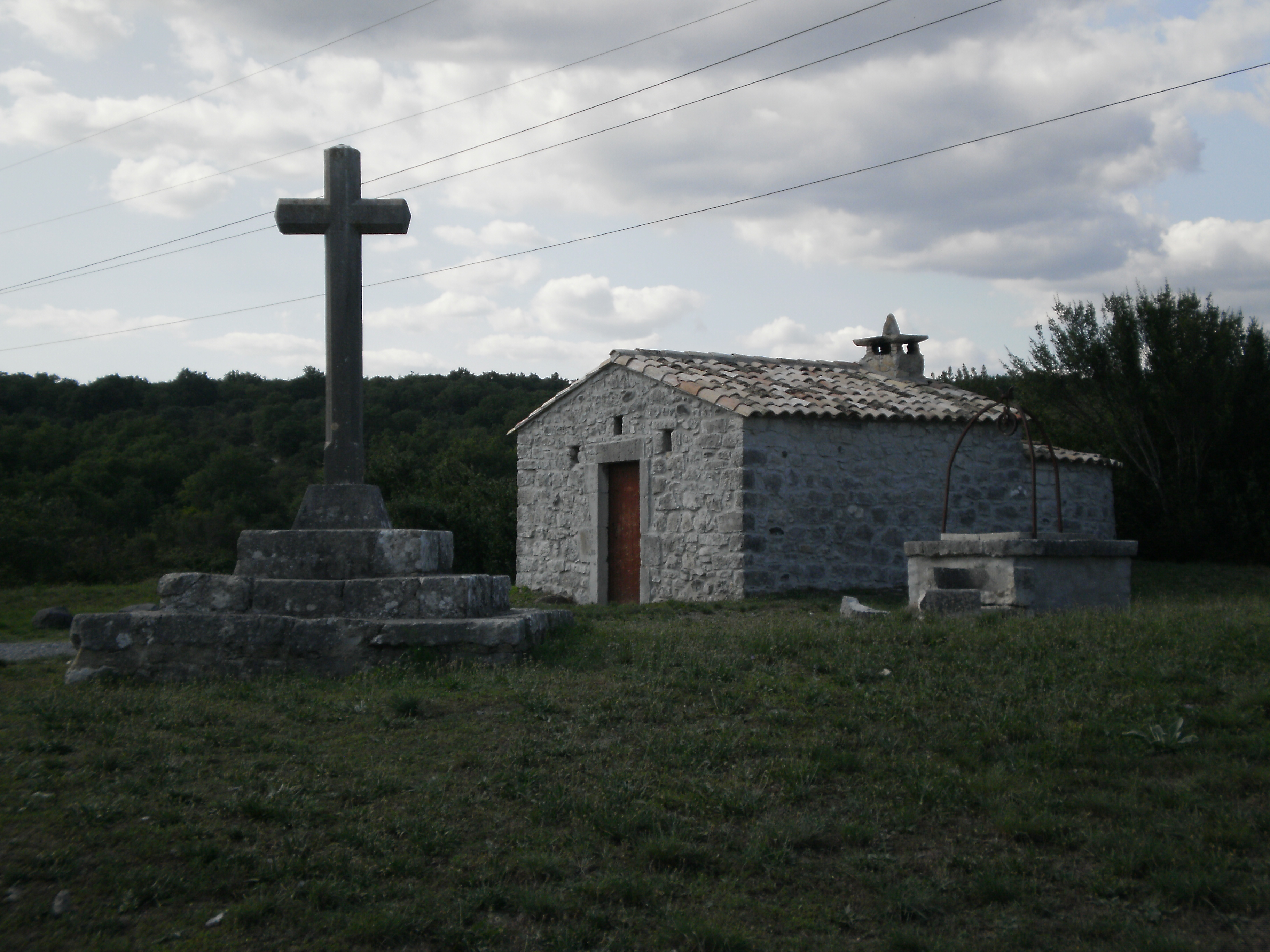 Photo prise le 5 août 2014 à 17h30